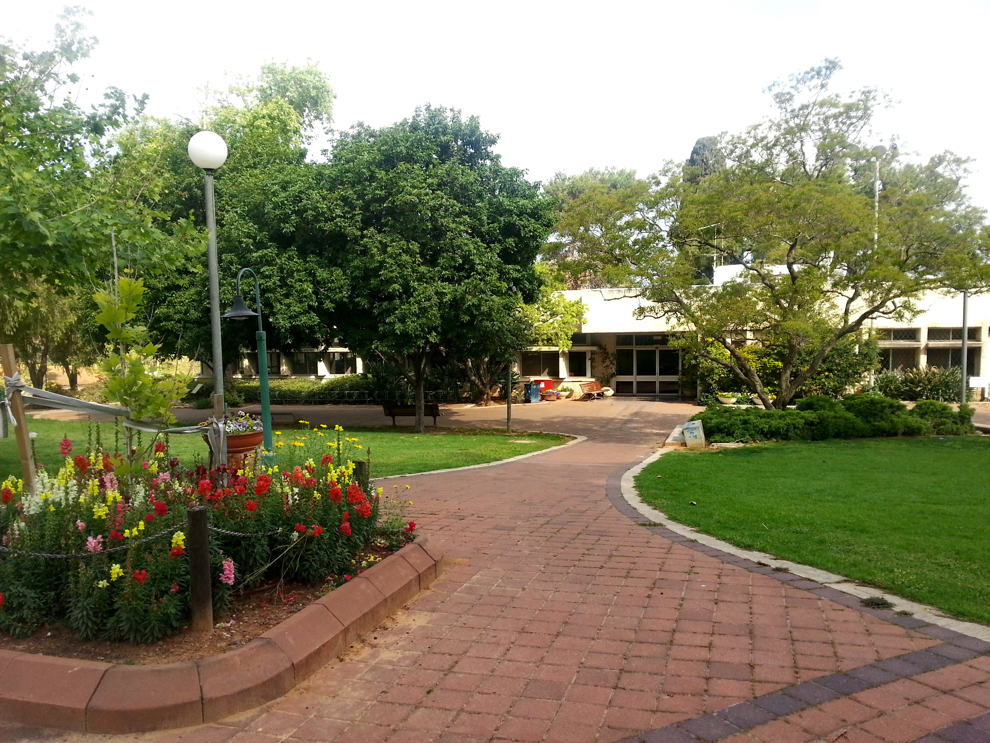 מבט אל מול חדר האוכל שנבנה בשנות החמישים של המאה הקודמת